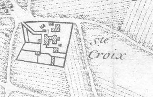 La collégiale Sainte-Marie en Champs (Sankt Maria in campis) ou « Heilig Kreuz » sur la "Plan de Mayence de ses nouvelles fortifications et de ses environs - 1736"